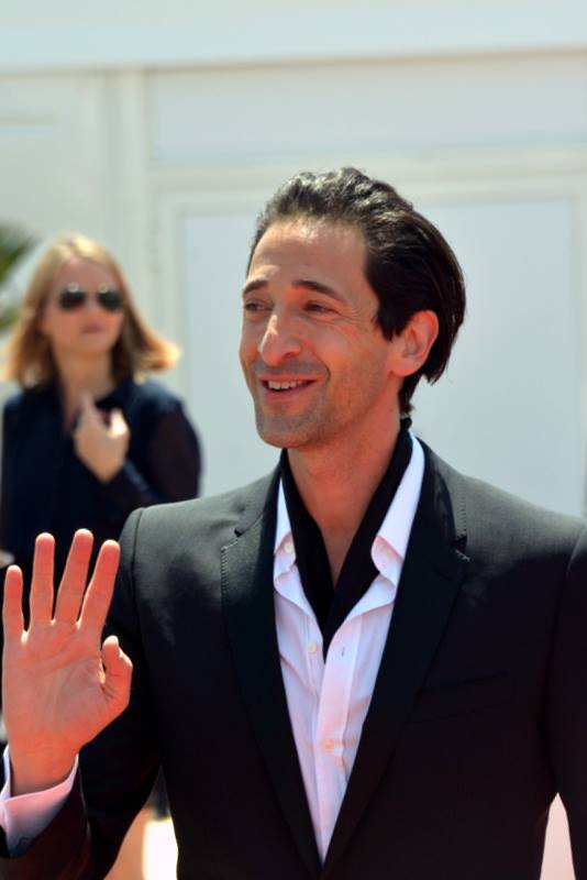 Adrien Brody au festival de Cannes